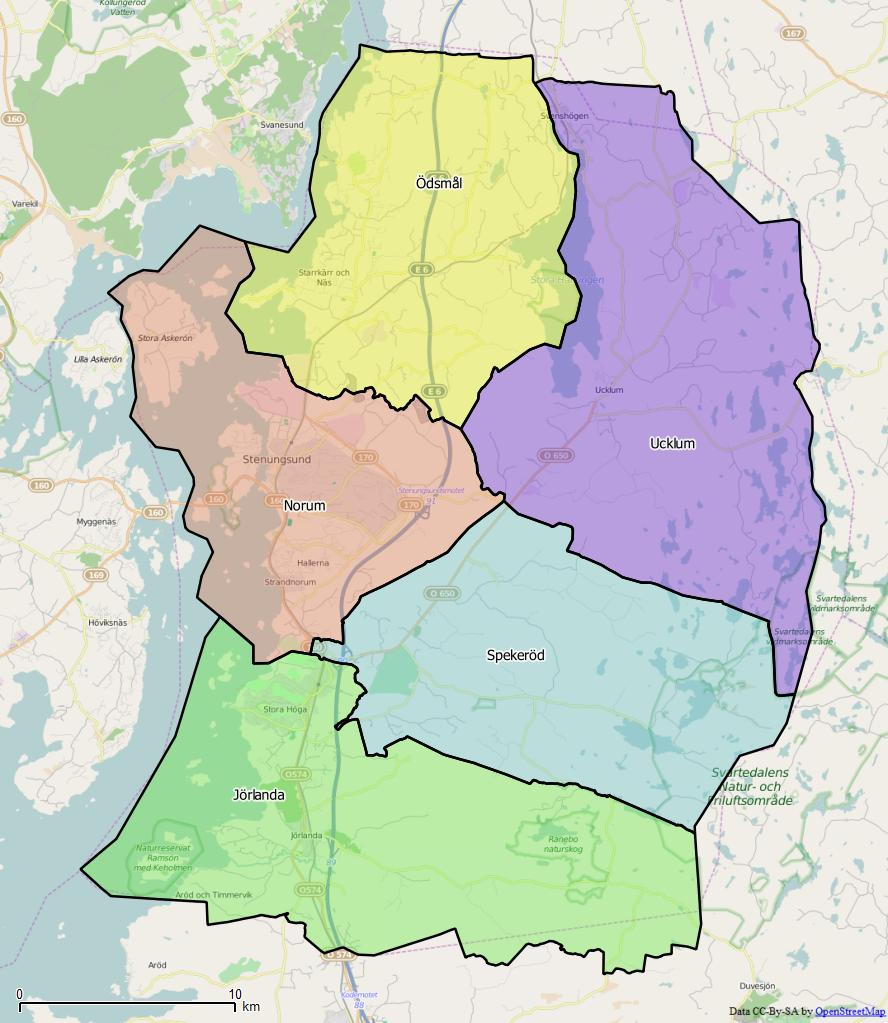 Distriktsindelningen i Stenungsunds kommun World file: 46.32249200713701498 0 0 -46.32249200713701498 1302851.86889382358640432 8003097.43045593611896038